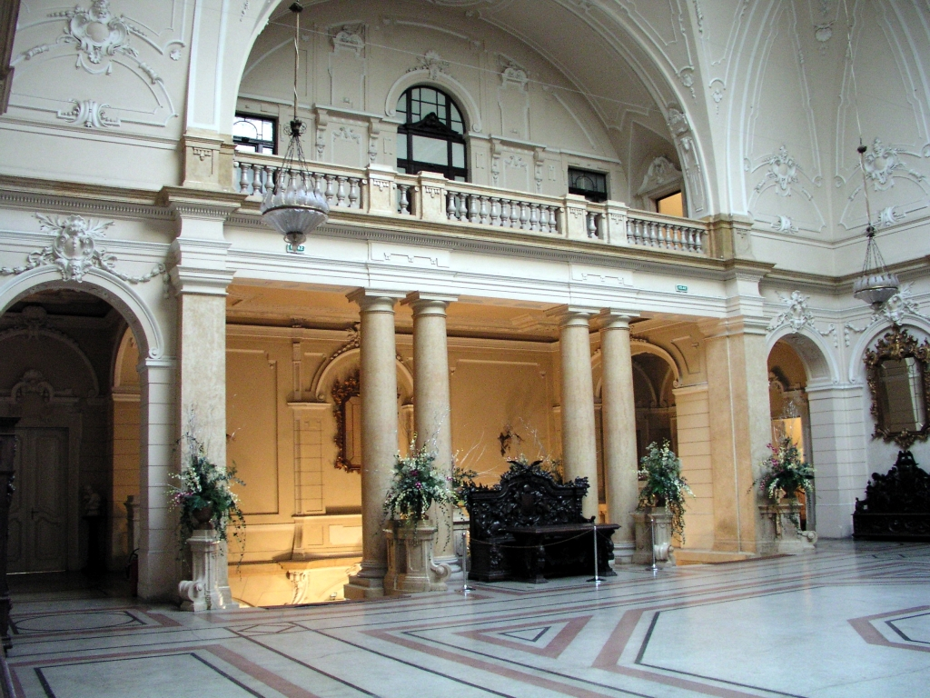 Unutrašnjost Pomorskog i povijesnog muzeja Hrvatskog primorja u Rijeci